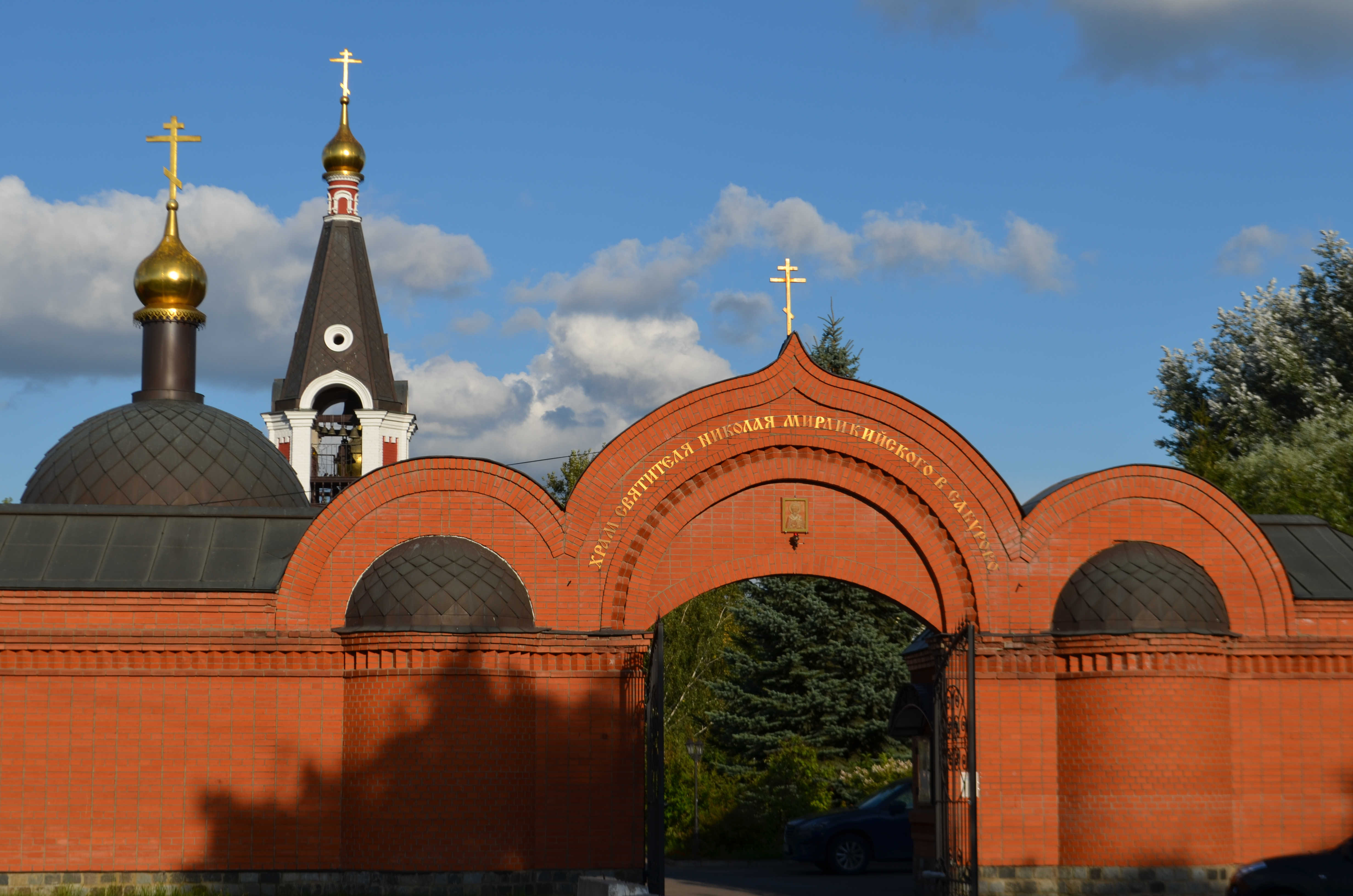 Вход к Храму Святителя Николая в Сабурове в Москве (Каширское шоссе, 59, корпус 4). 15 августа 2020 года